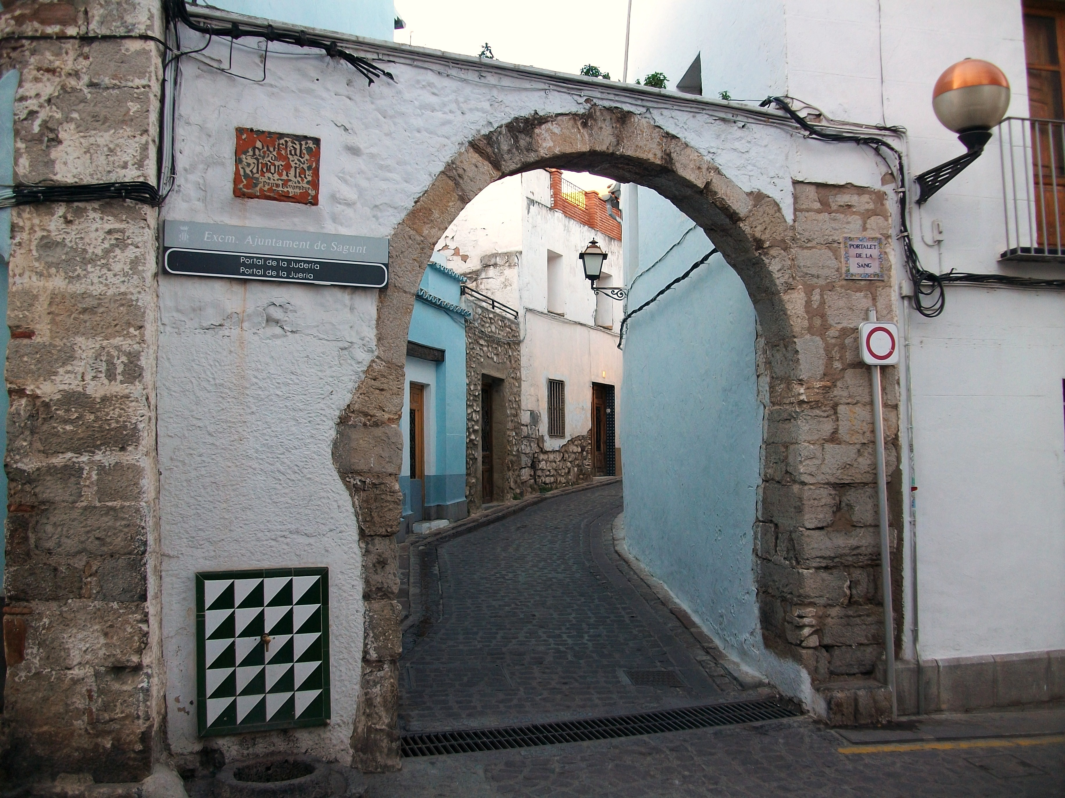 Portalet de la Sang, Jueria o Call de Sagunt, País Valencià.